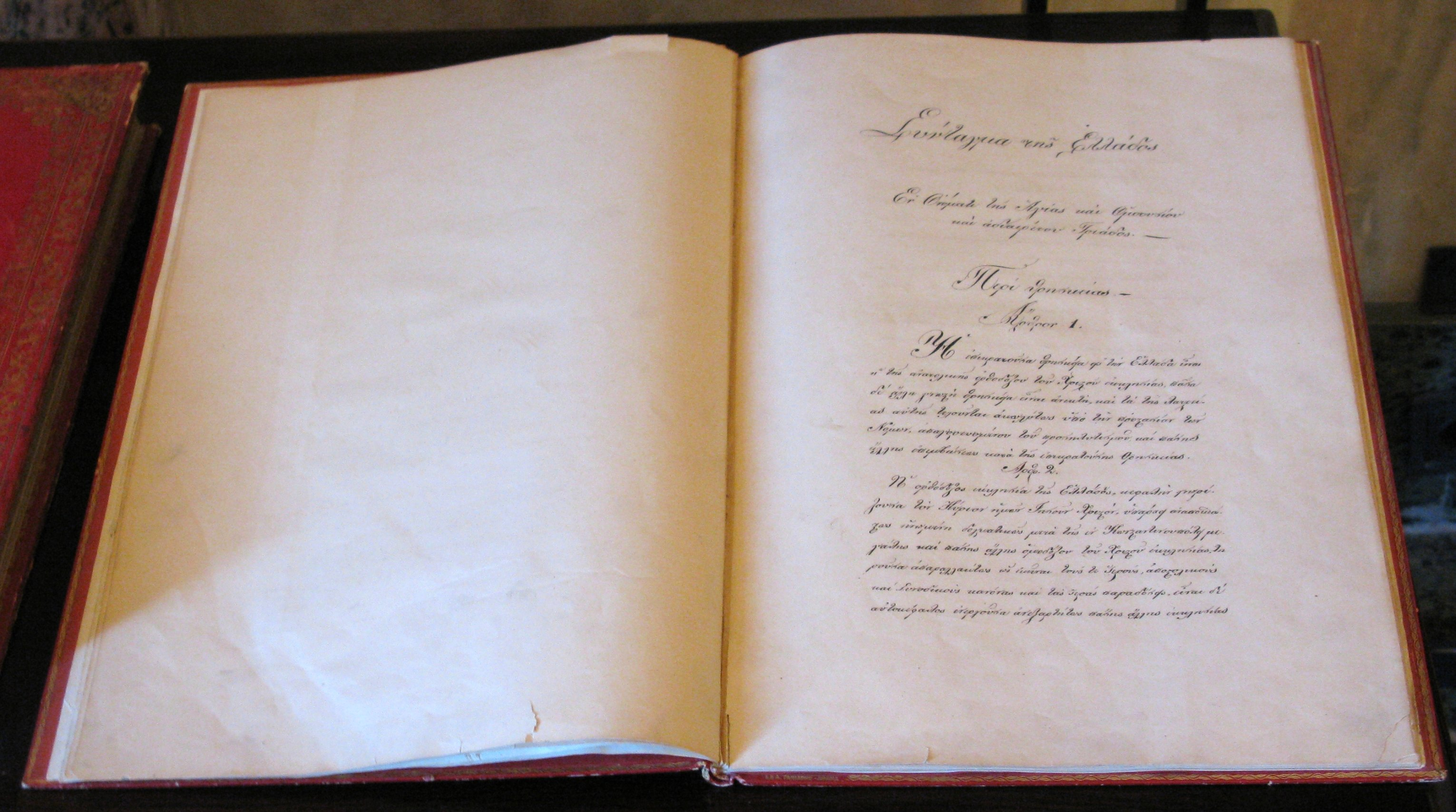 Το Σύνταγμα του 1844. Χειρόγραφο. Βιβλιοθήκη της Βουλής.